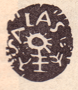 Segell municipal antic de Salàs de Pallars (Pallars Jussà)